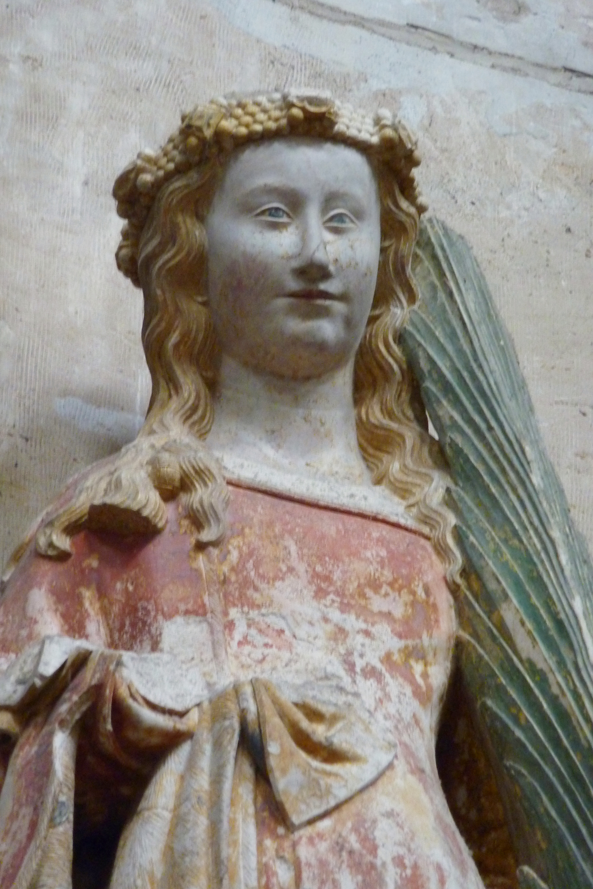 katholische Pfarrkirche Notre-Dame in Poissy, Statue der hl. Barbara (14. Jahrhunderts)